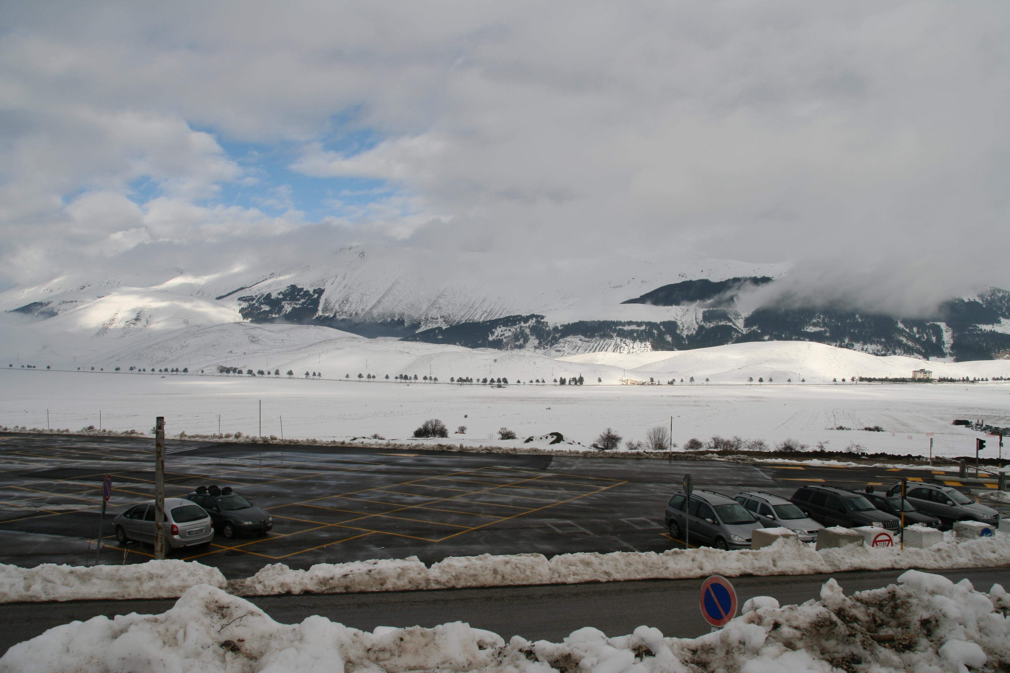 altopiano delle cinque miglia (DC)